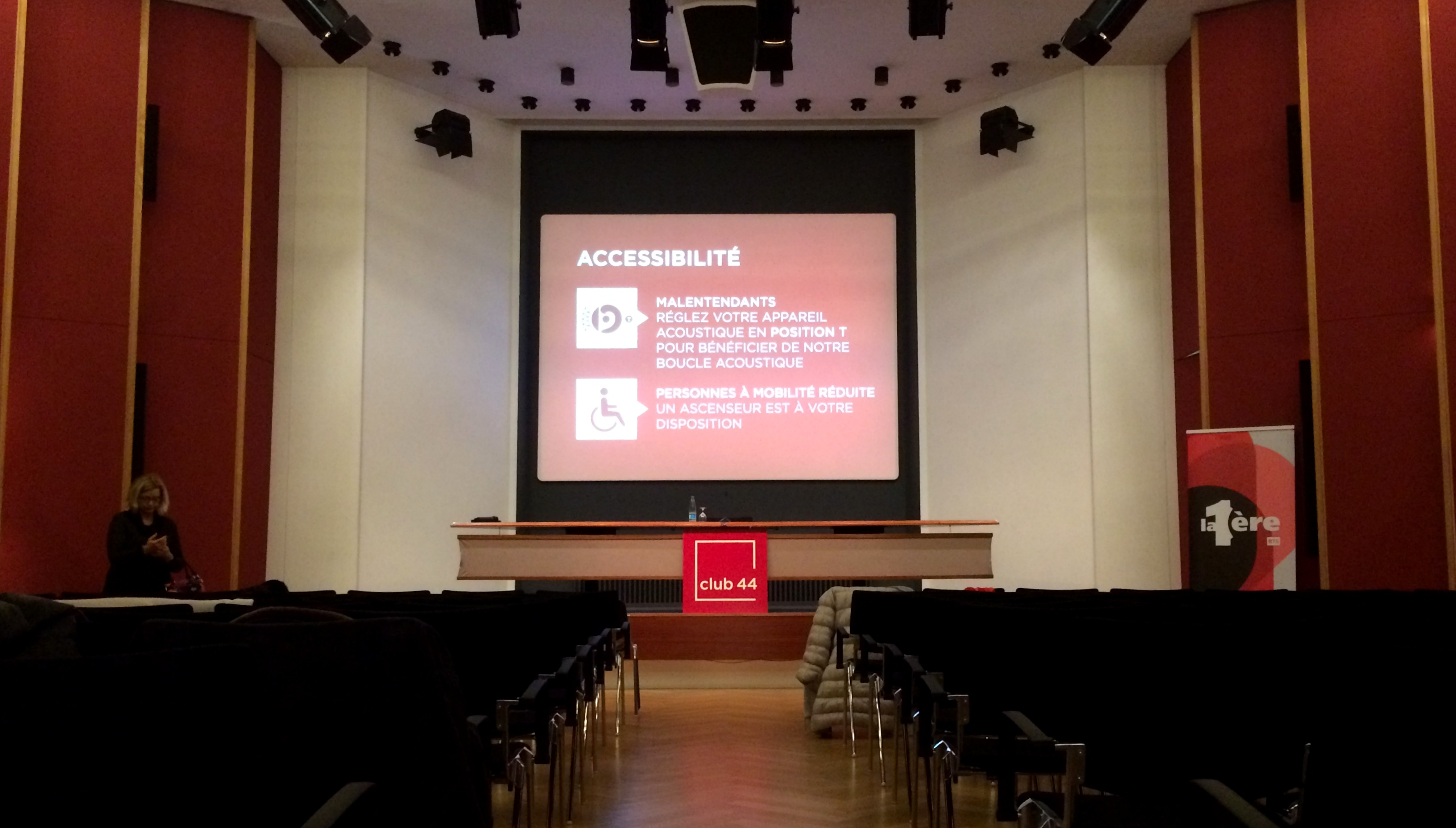 Vortragssaal des Club 44 in La-Chaux-de-Fonds